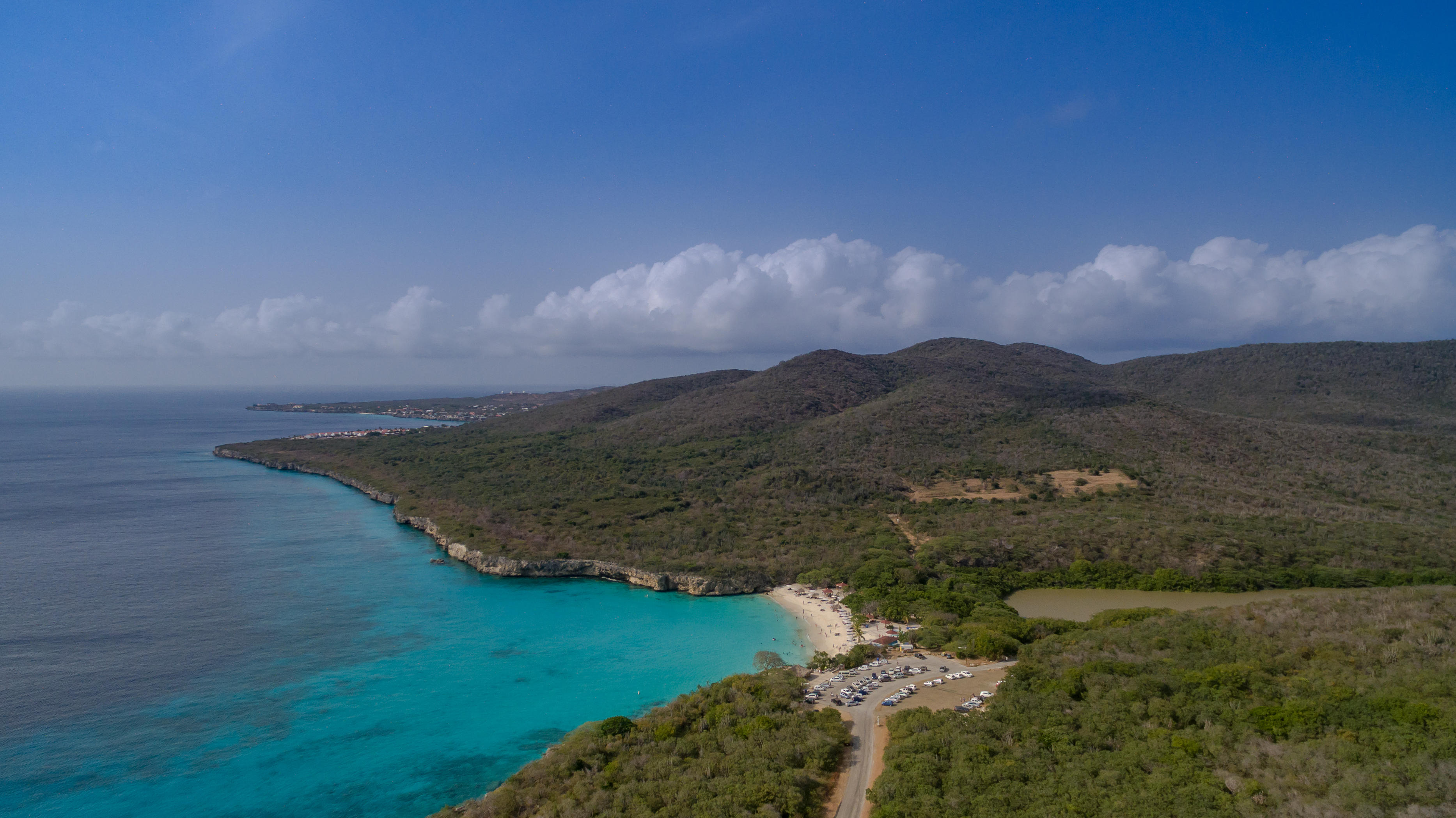 Curacao Dushi Curacao